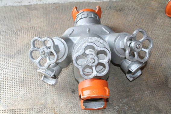 Division mixte des sapeur-pompiers français